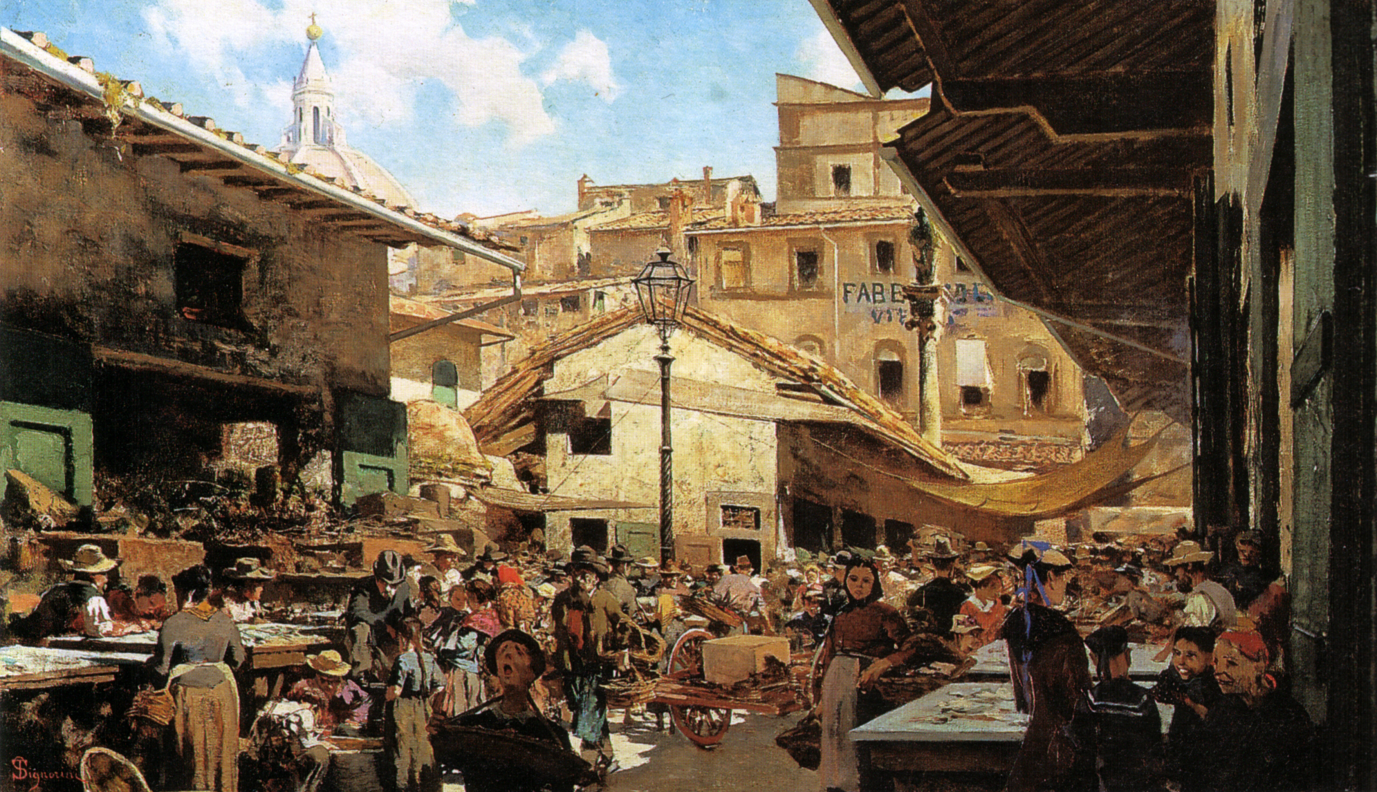 Telemaco_Signorini, see filename